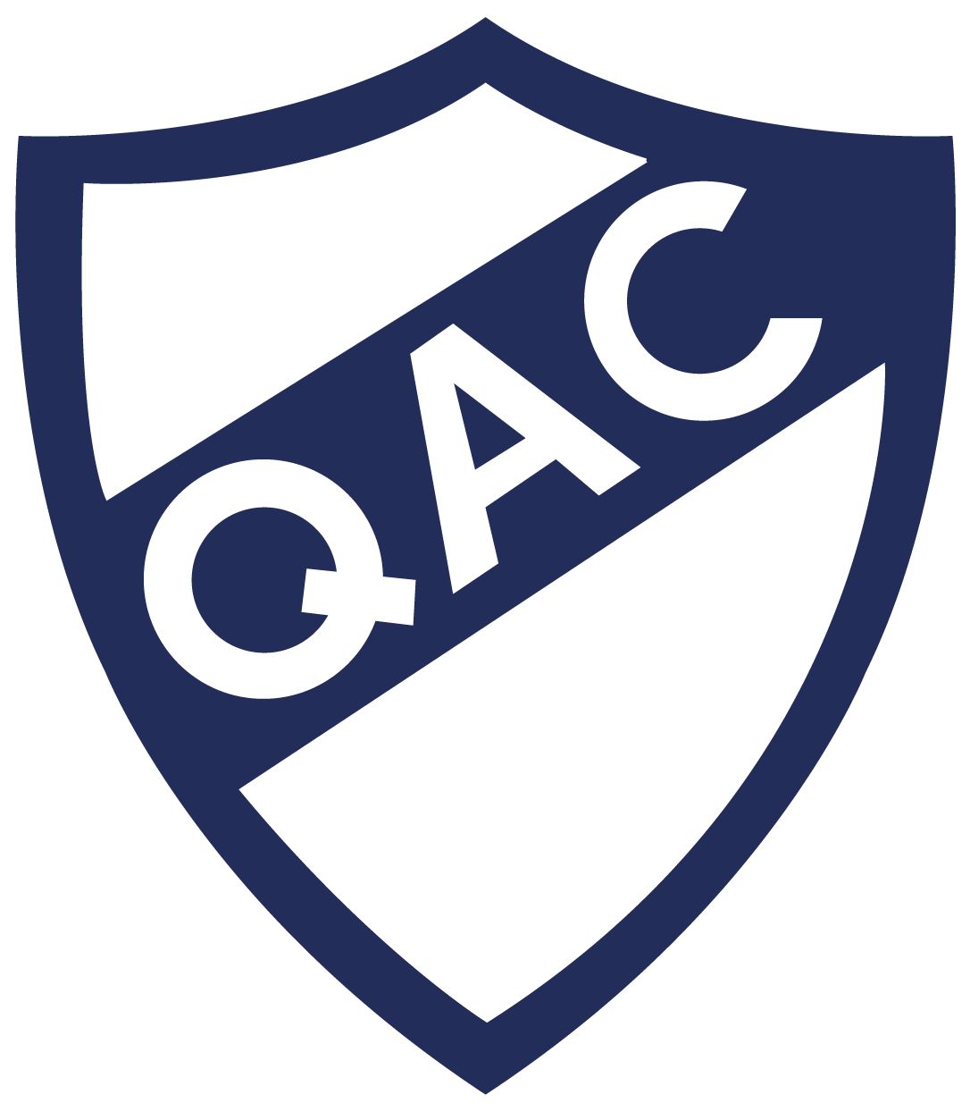 Escudo del Quilmes Atlético Club (Desde el 2016 en adelante)